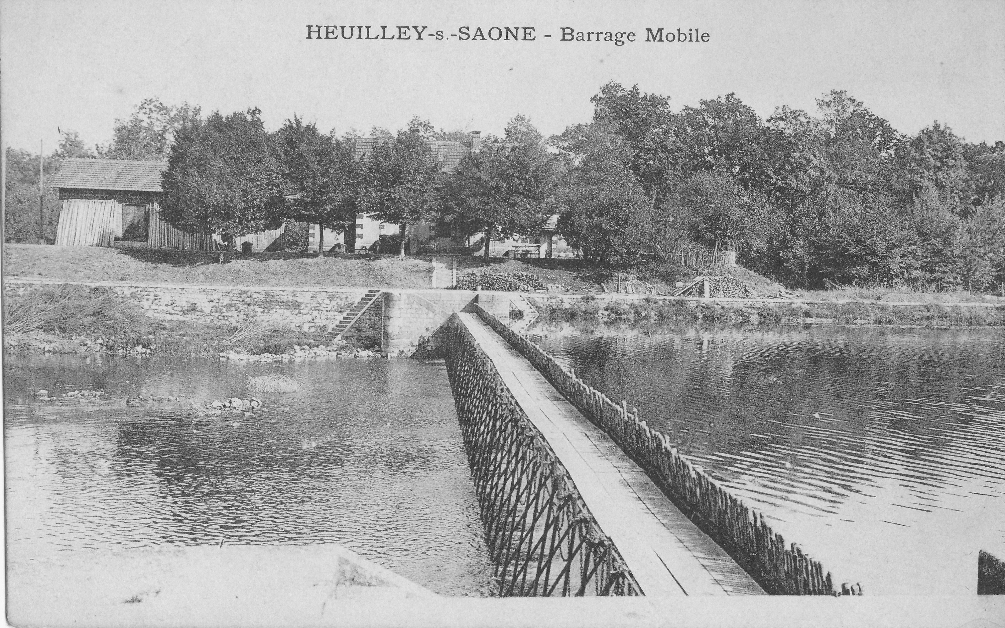 Carte postale ancienne montrant le barrage mobile d'Heuilley-sur-Saône en 1915